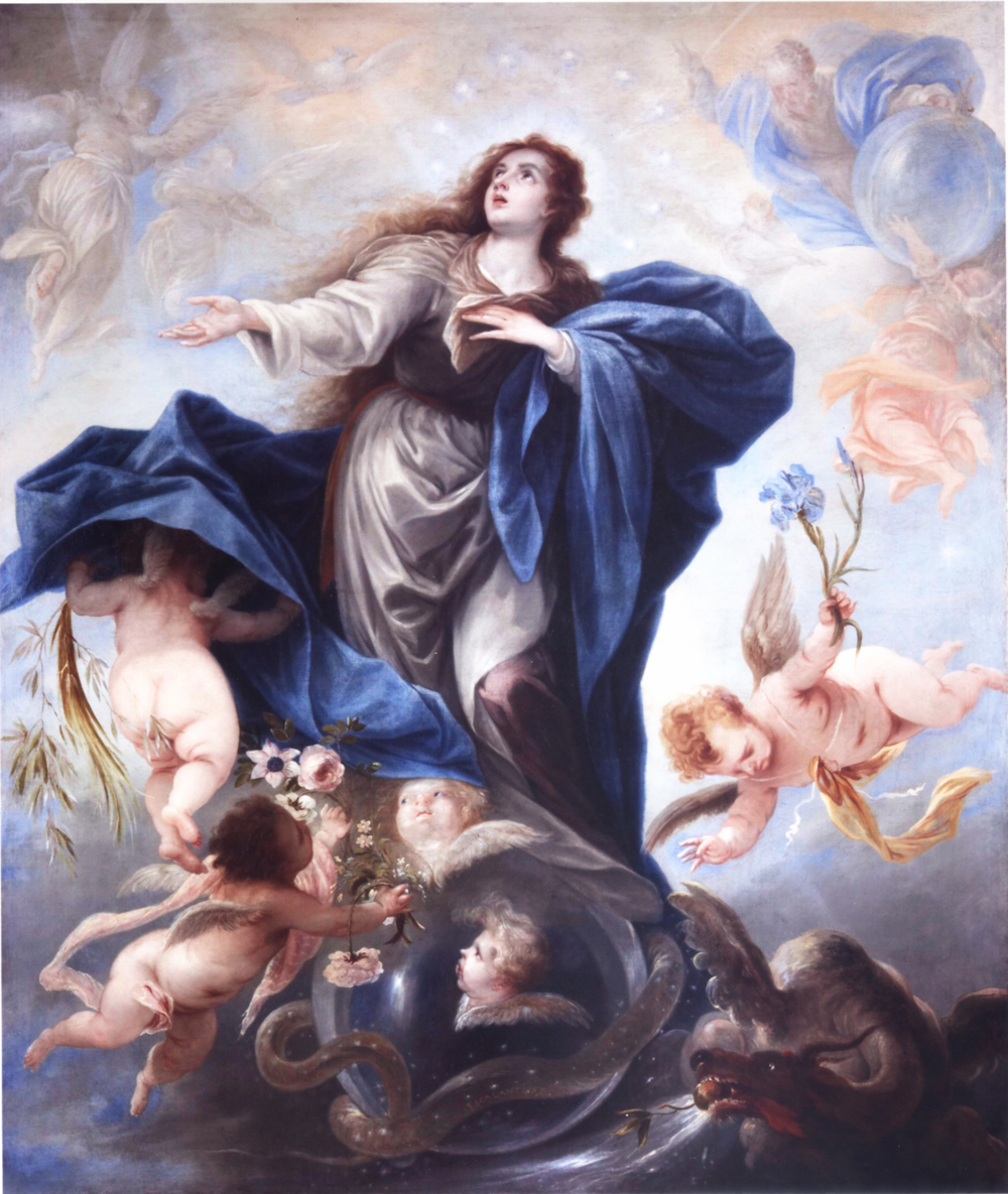 La obra representa la Inmaculada Concepción de la Virgen María.